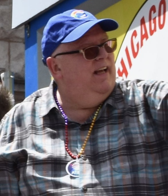 Tom Skilling